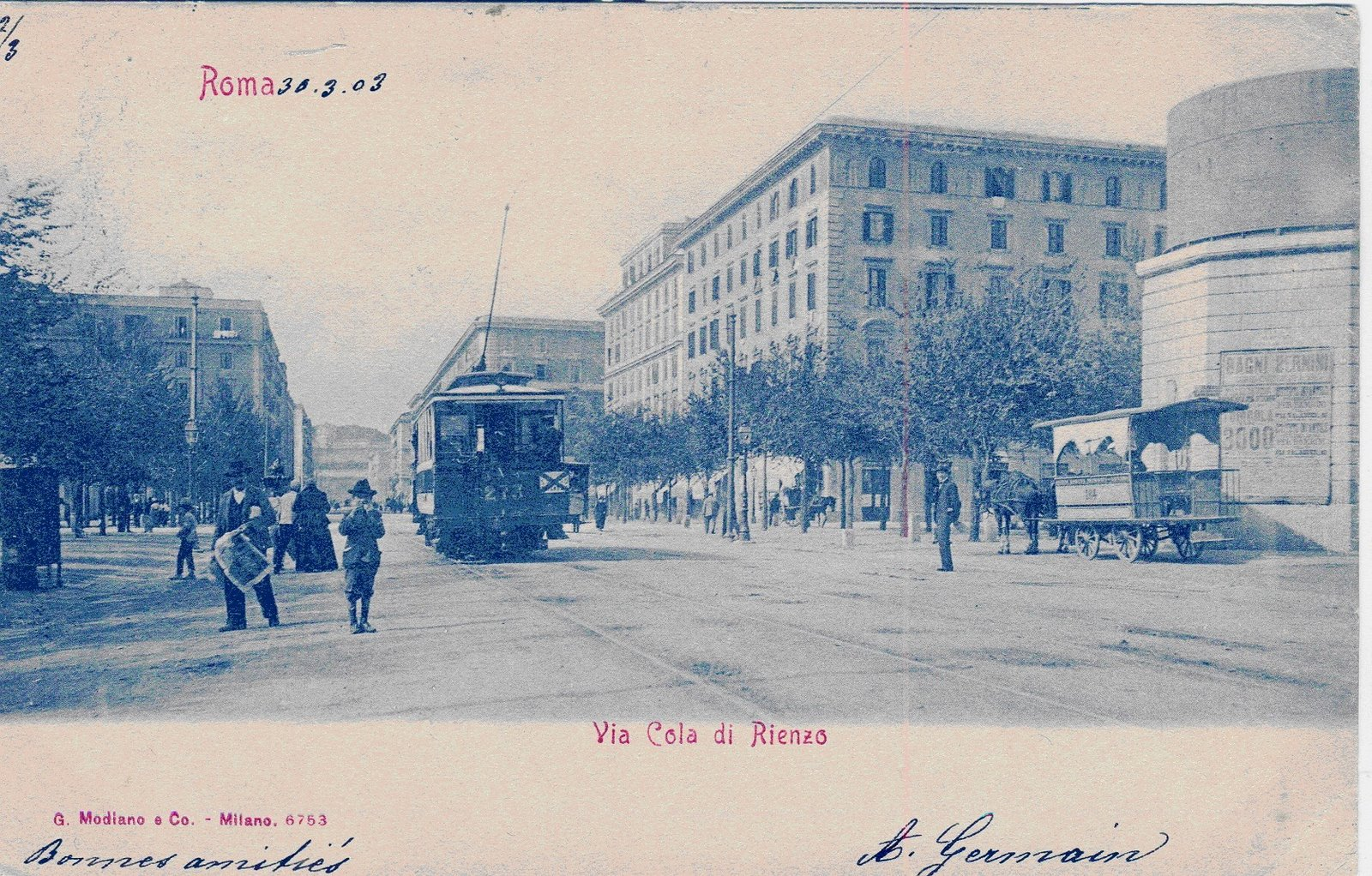 Via e Piazza Cola di Rienzo a Roma agli inizi del 1900